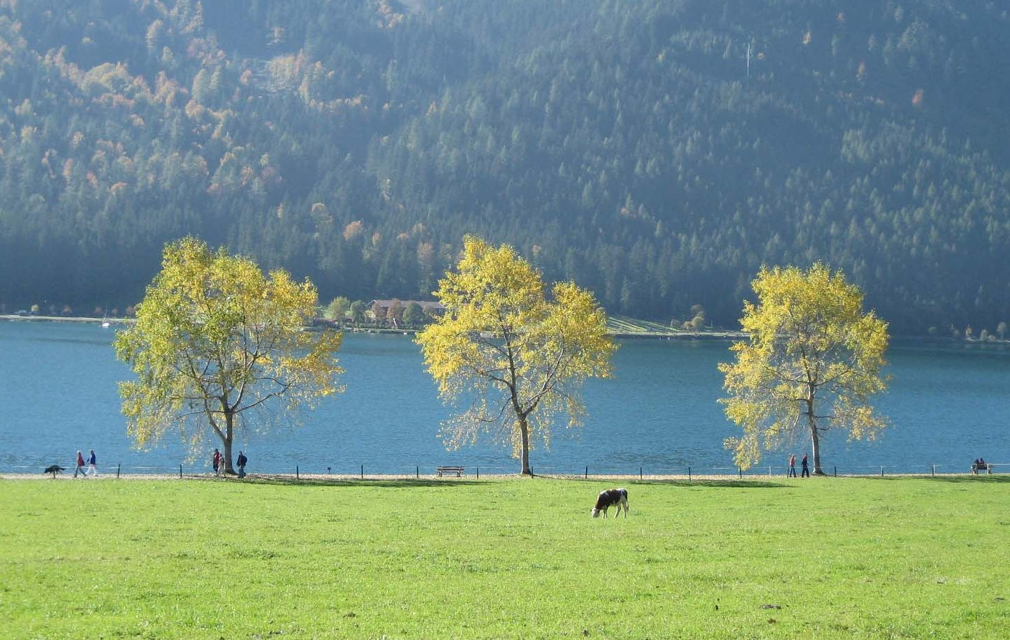 Herbst am Achensee